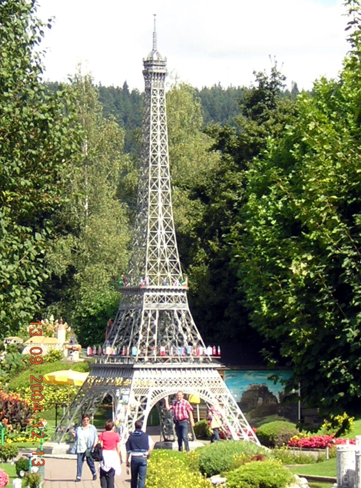 A párizsi Eiffel-torony kicsinyített mása (Ausztria, Klagenfurt, Minimundus Park)